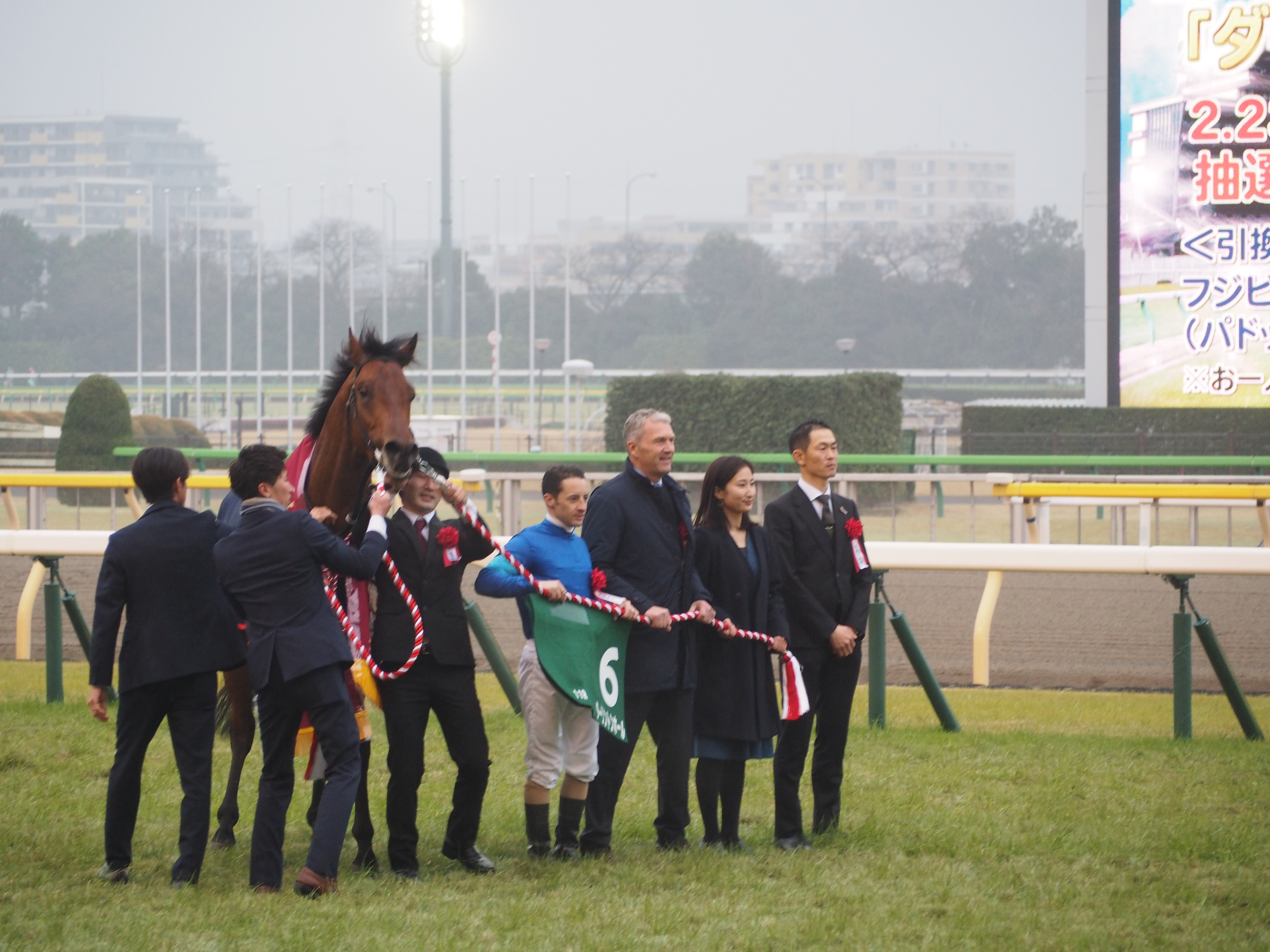 2020年の共同通信杯に臨む、ダーリントンホールとクリストフ・ルメール